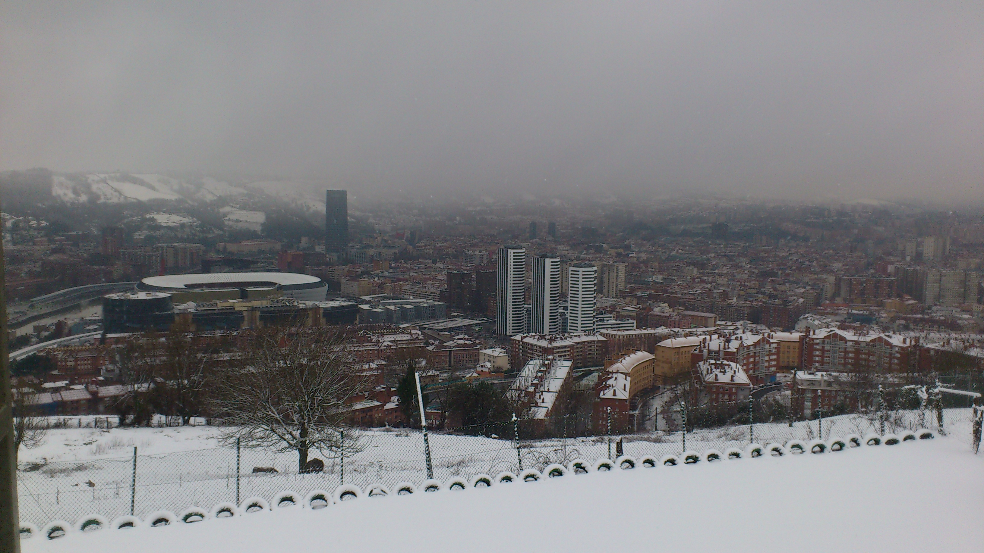 Masustegi-Monte Caramelo, 48002 Bilbo, Bizkaia, Spain